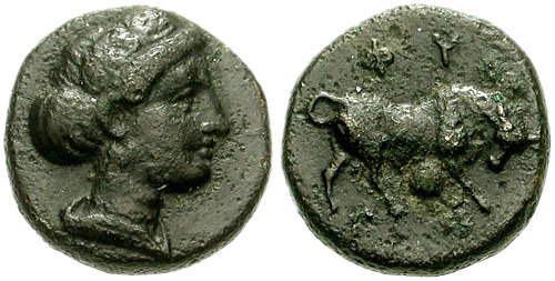 Moeda da cidade de Pígela, na Jônia